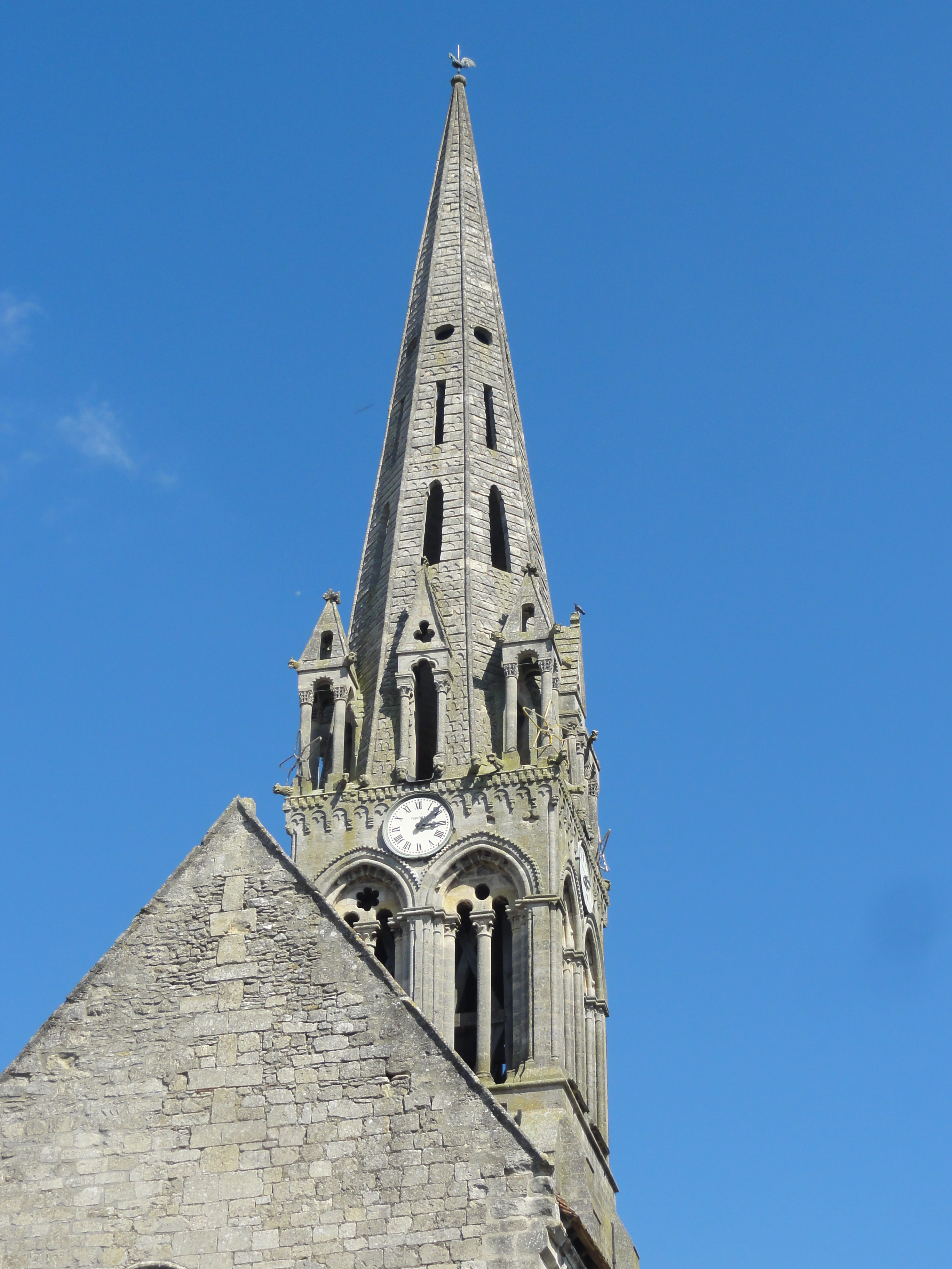 La flèche depuis l'ouest.